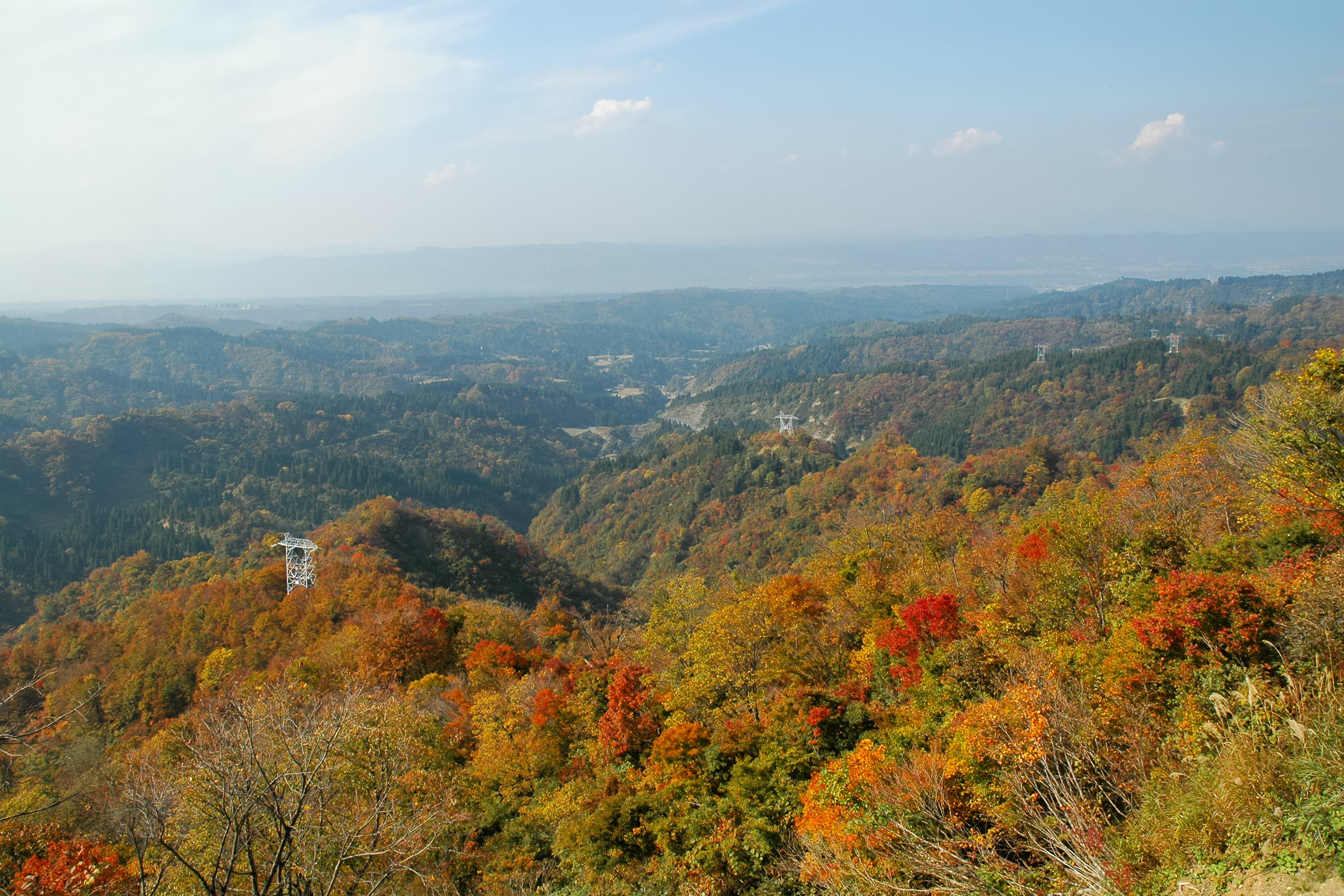 Uonuma Skyline, Niigata, Japan (魚沼スカイライン)